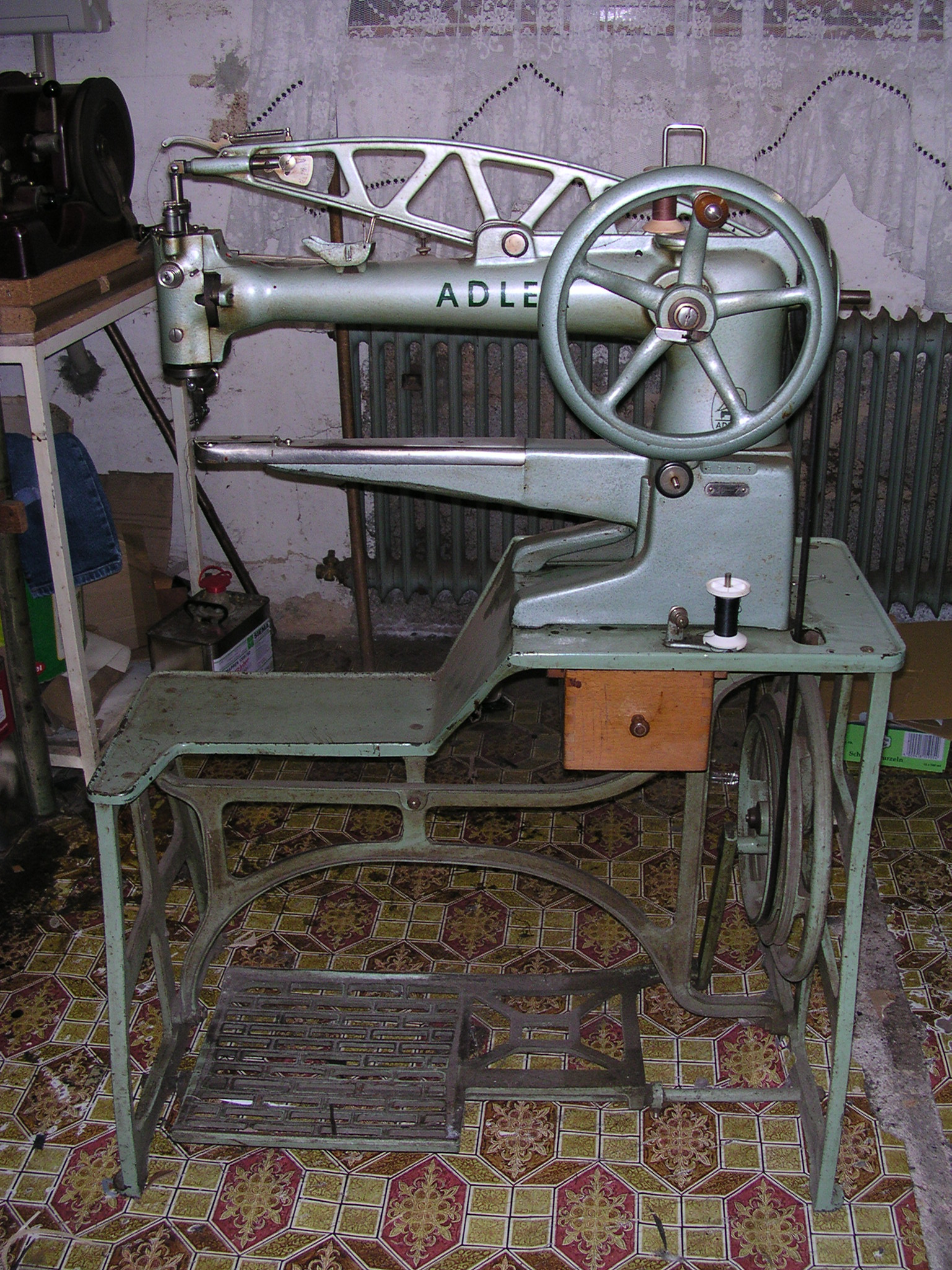 Adler Schuhmacher-Nähmaschine